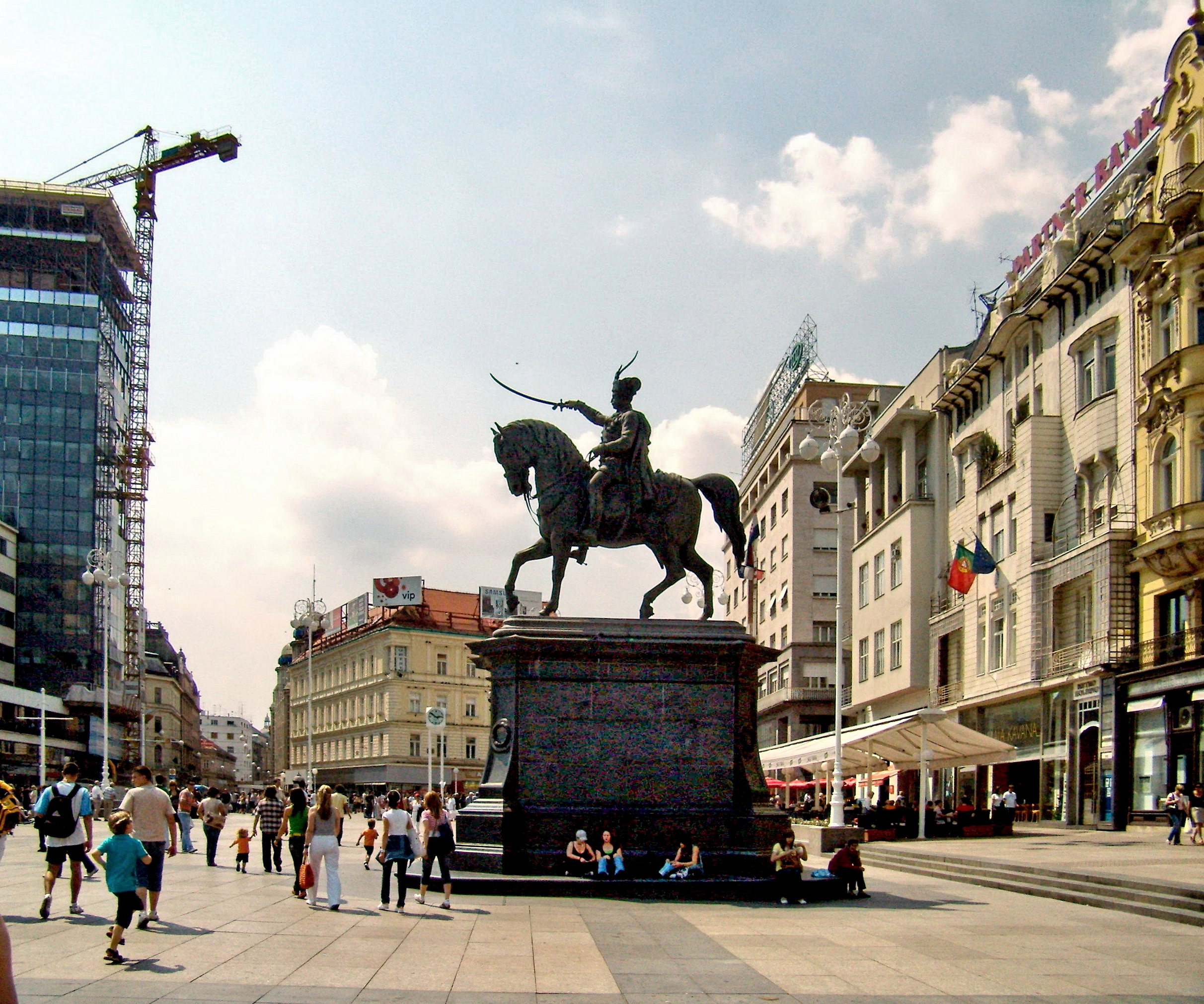 Trg bana Jelačića u Zagrebu